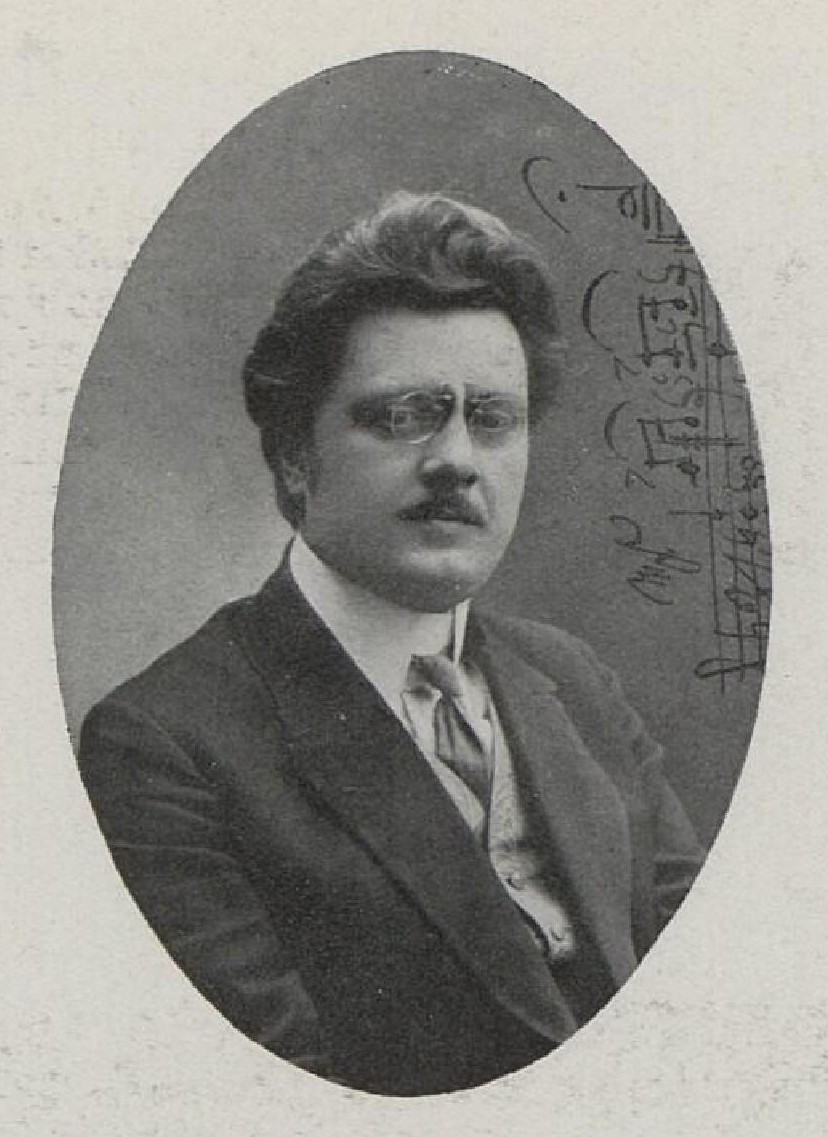 Adolf Piskáček (1873-1919), český hudební skladatel, sbormistr, hudební pedagog a spisovatel